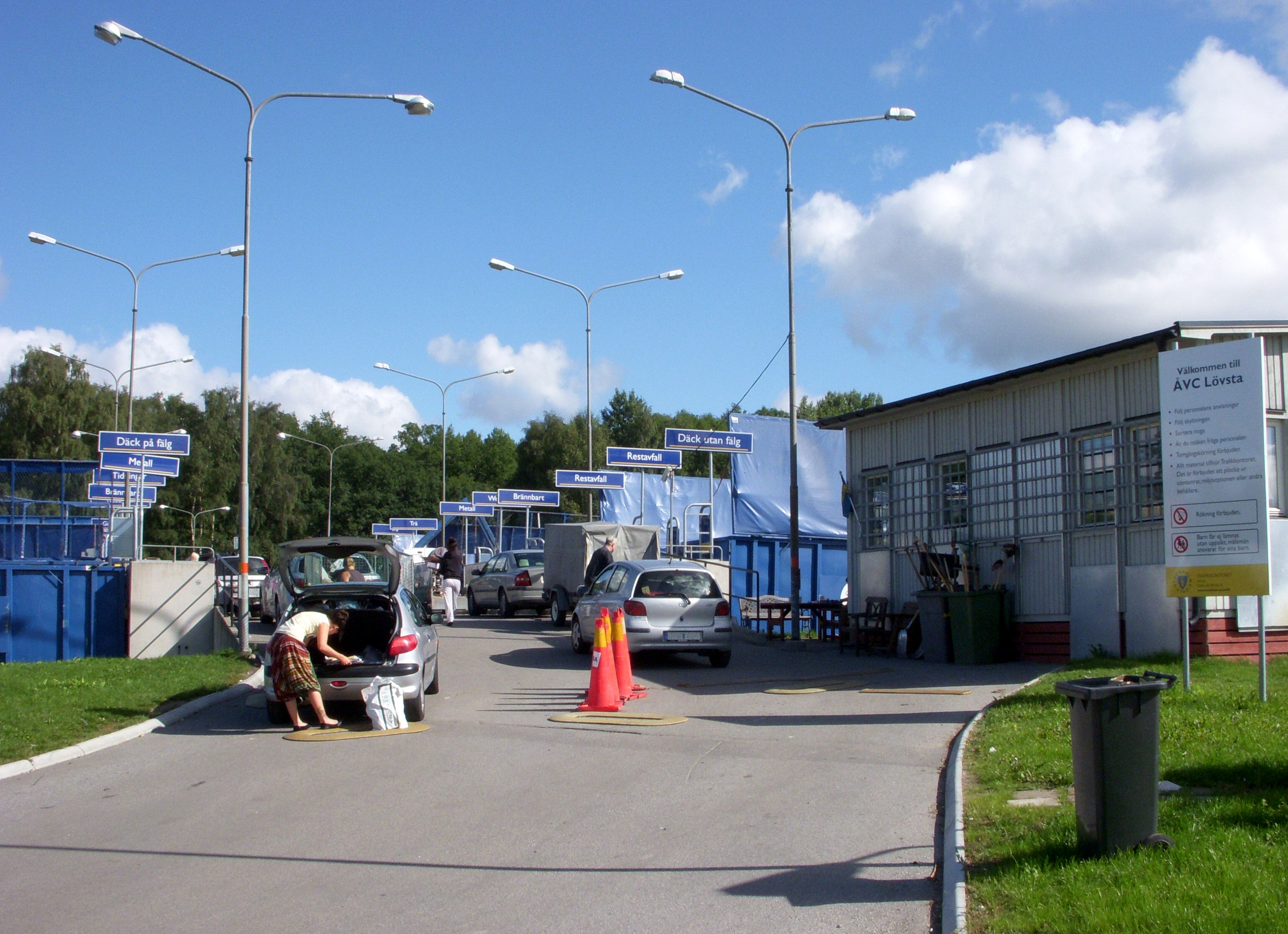 Lövsta sopåtervinning